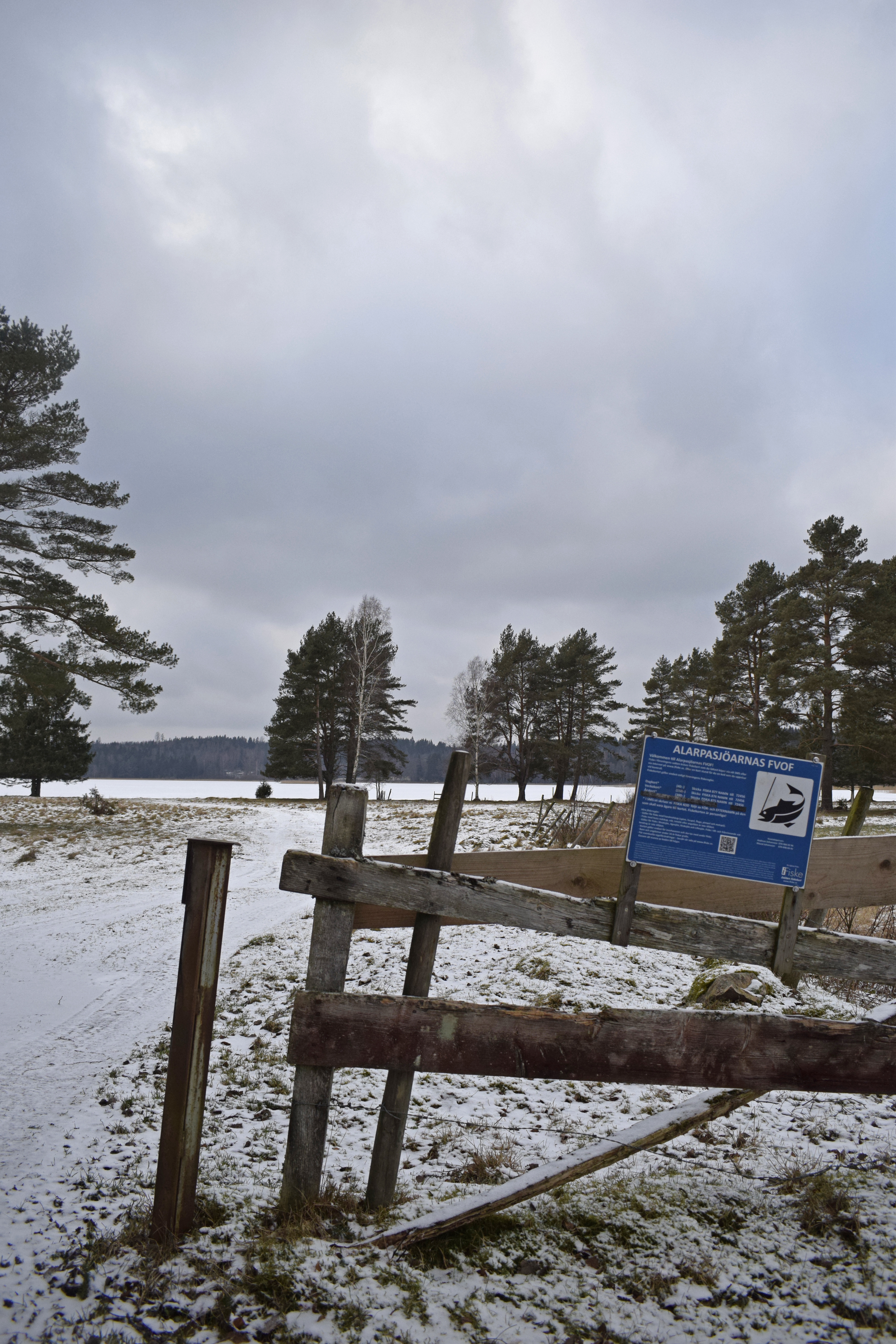 Denna bilden visar bilvägen till Kroksjön.